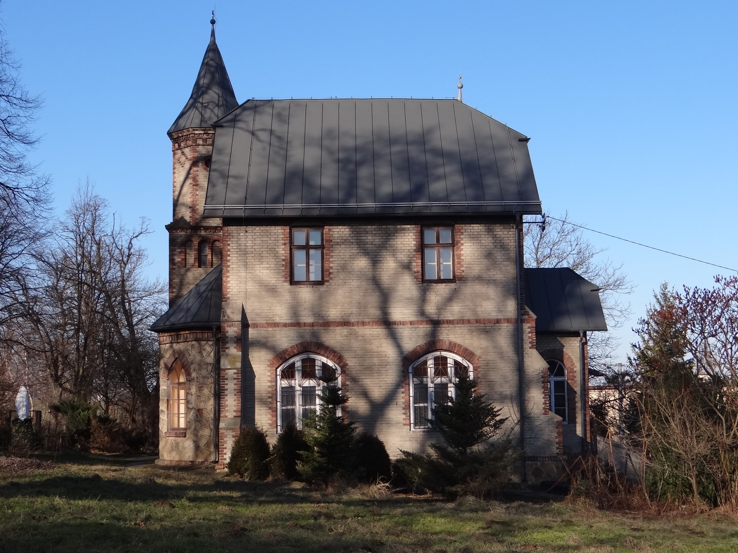 Kaplica w Grodkowicach